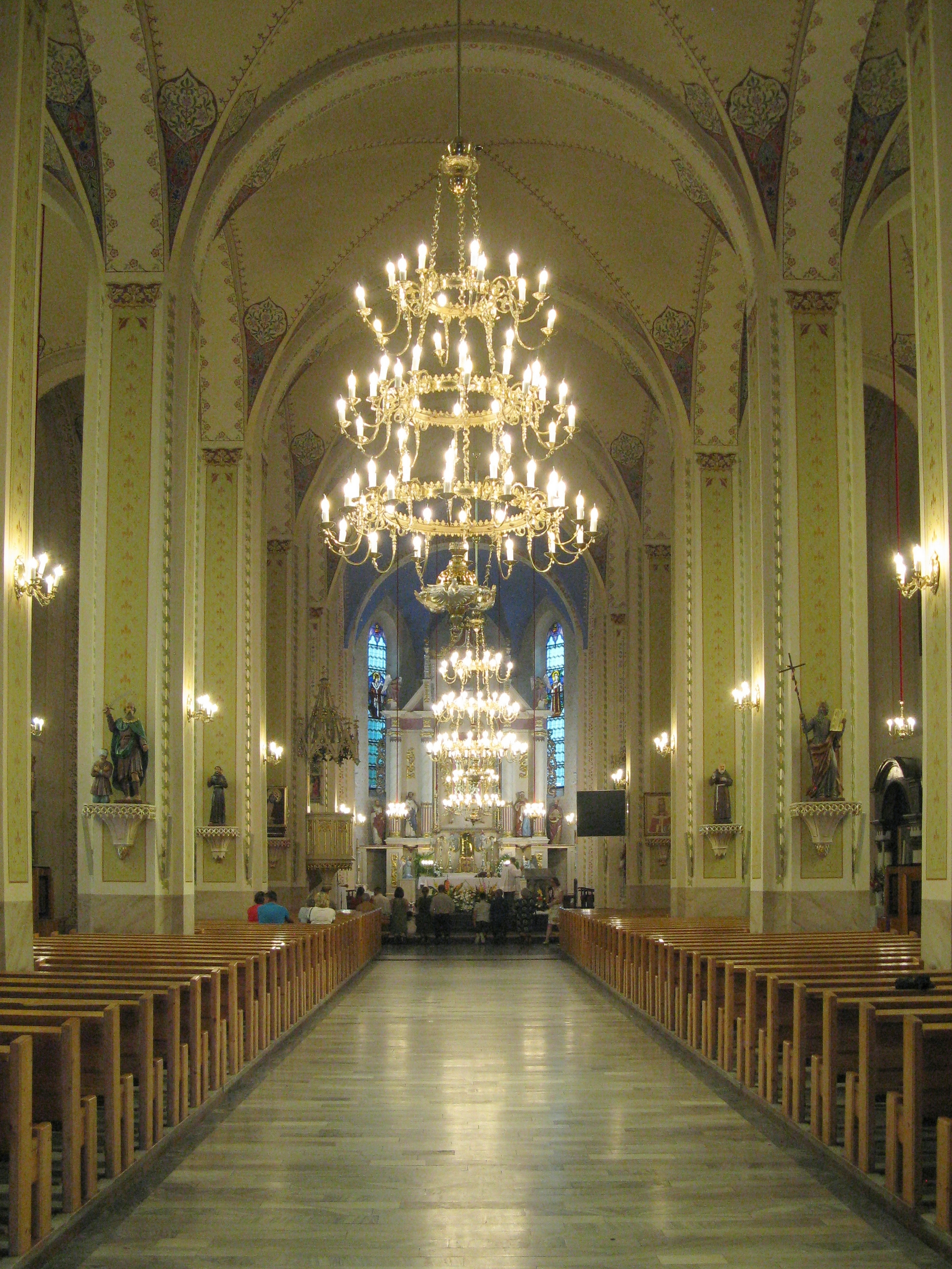 Rajcza, Kościół św. Wawrzyńca i św. Kazimierza Królewicza w Rajczy, wnętrze Wikidata has entry Q11747537 with data related to this item.